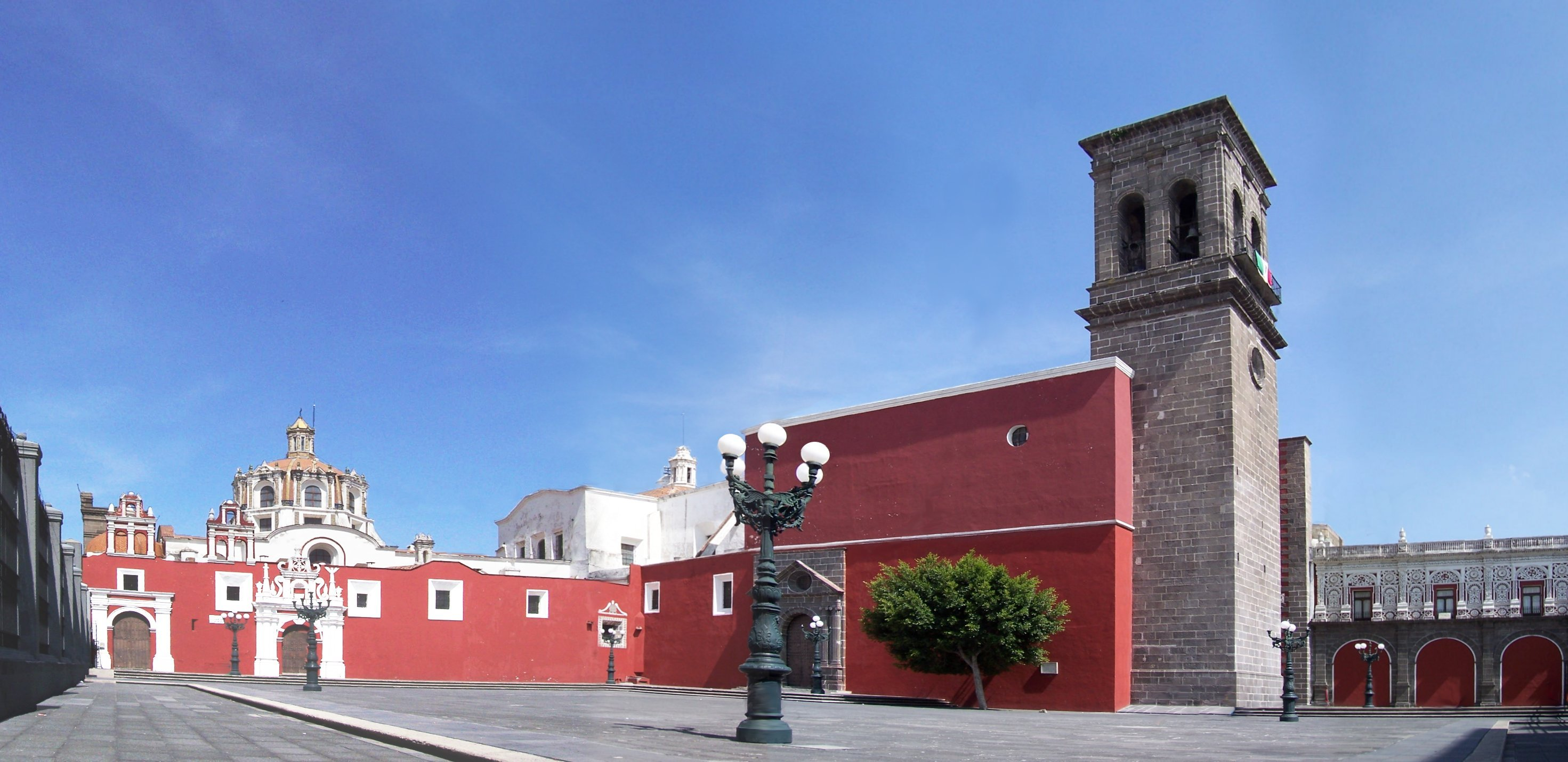 Atrio del templo de Santo Domingo, en panoramica, Ciudad de Puebla, México